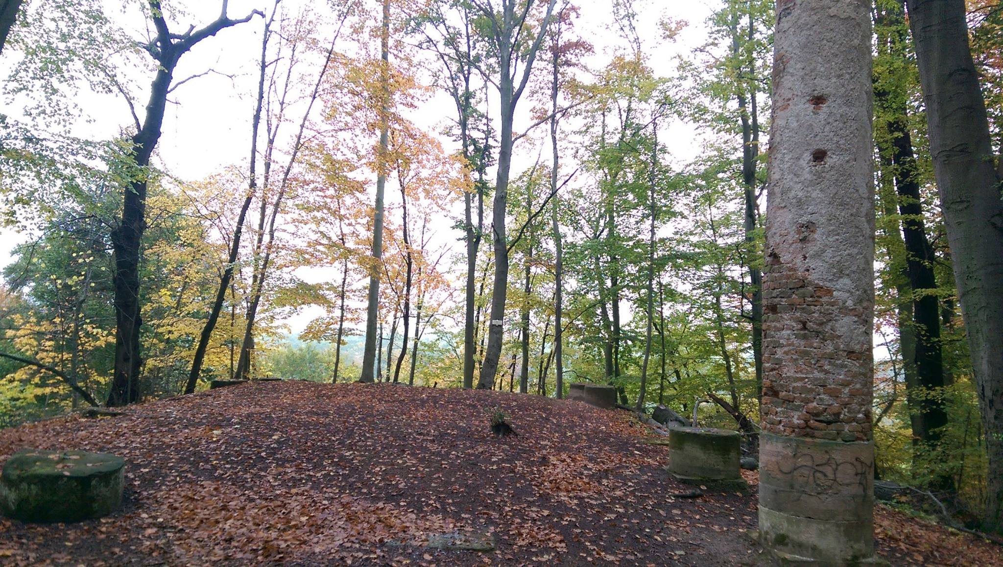 Zrúcanina tzv. Rytierskej siene postavená rodom Lichenštajnov, CHKO Litovelské Pomoraví